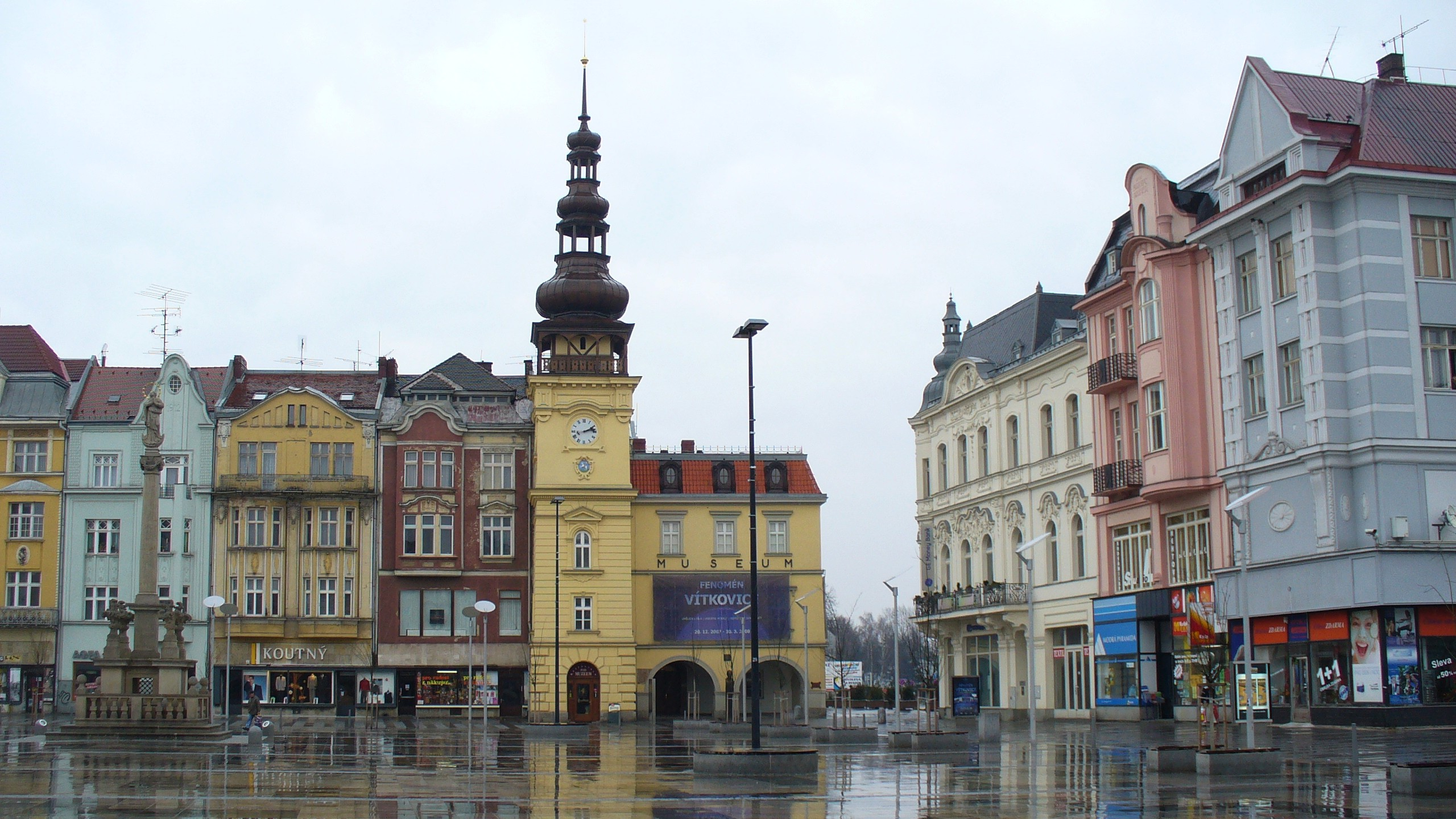 Ostrava (Ostrawa, Ostrau) - Masarykovo náměstí (market square)